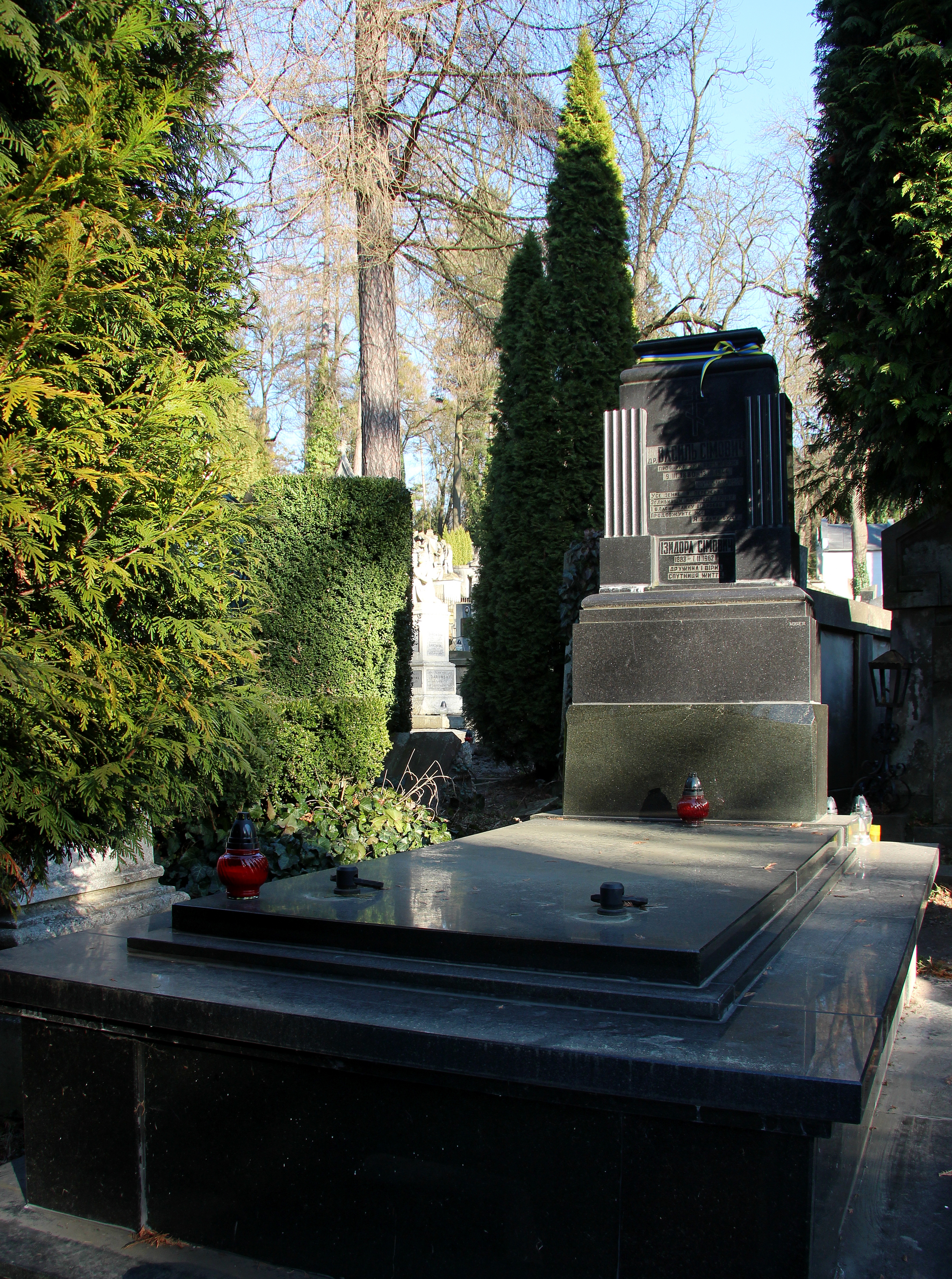 Гробівець родини Сімовичів.Личаківський цвинтар , поле № 5.